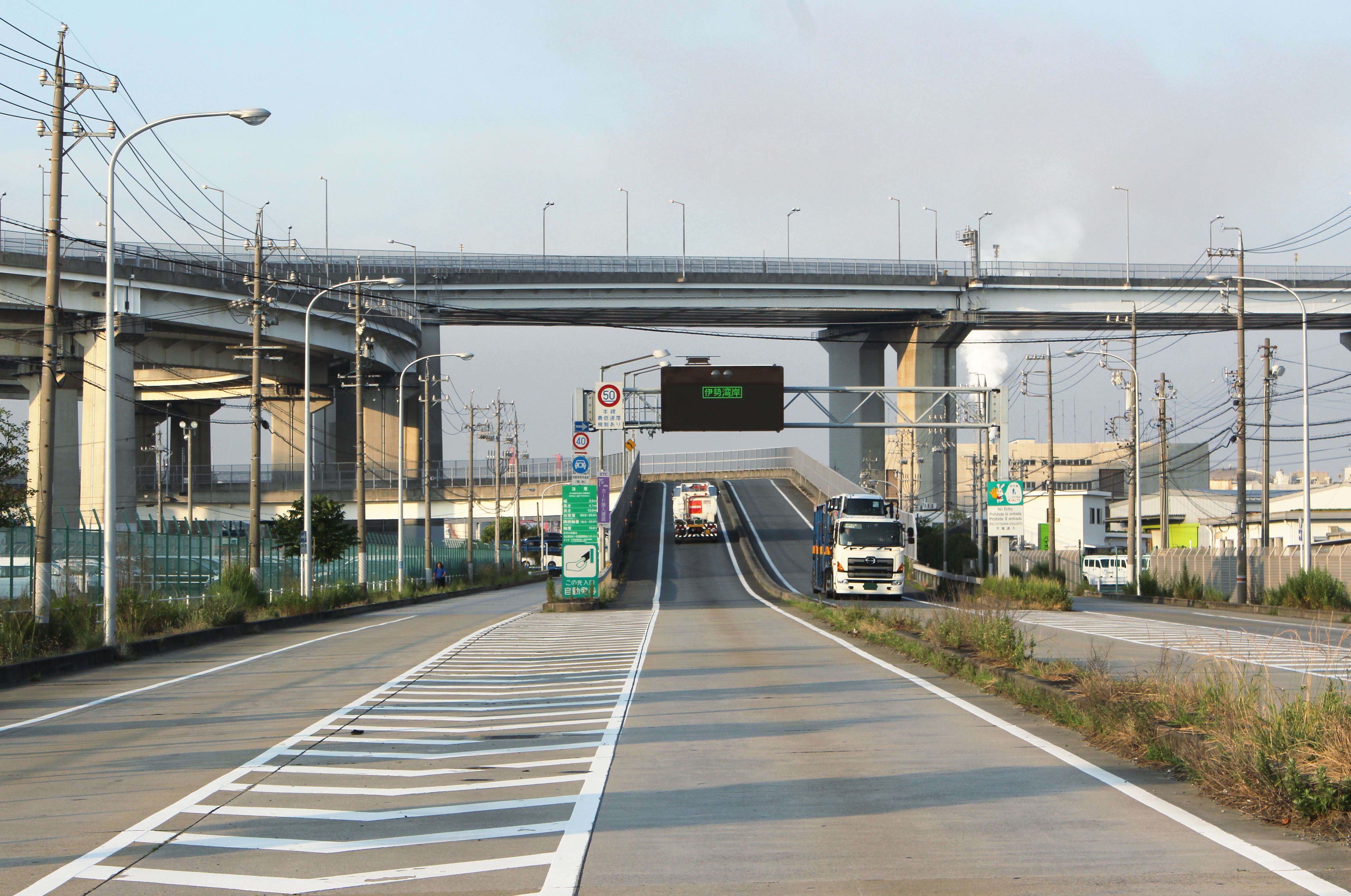 伊勢湾岸道路 名港潮見インターチェンジ